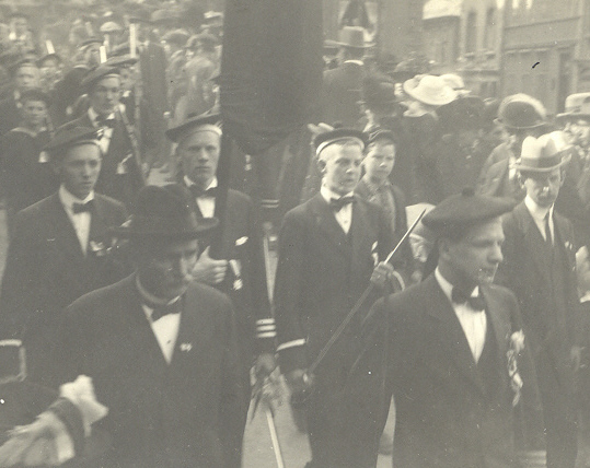 Hilmar Reksten som fanebærer i Nordnæs Bataillon